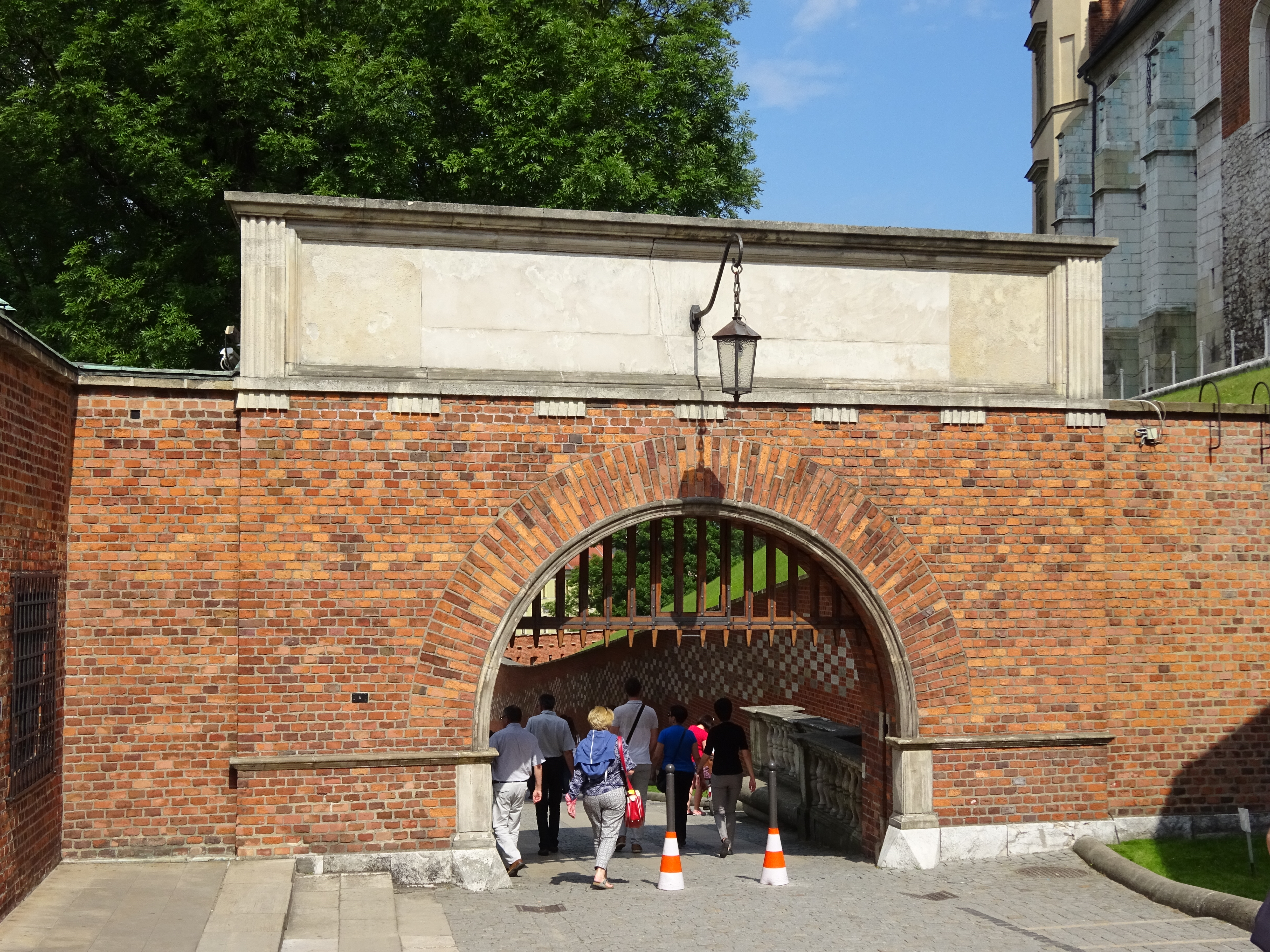 Brama Herbowa na Wawelu. Widok od strony wewnętrznej (Bramy Herbowej). Kraków, 2016.